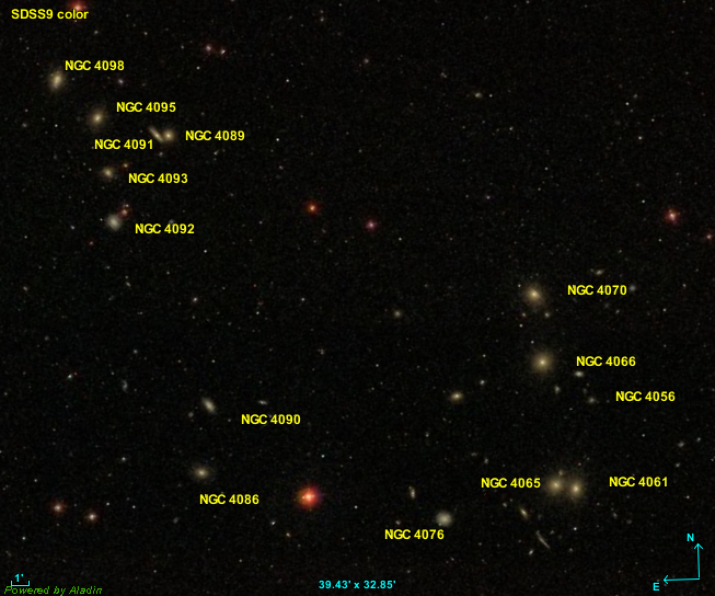 Réalisée avec Aladin et les données de l'étude SDSS